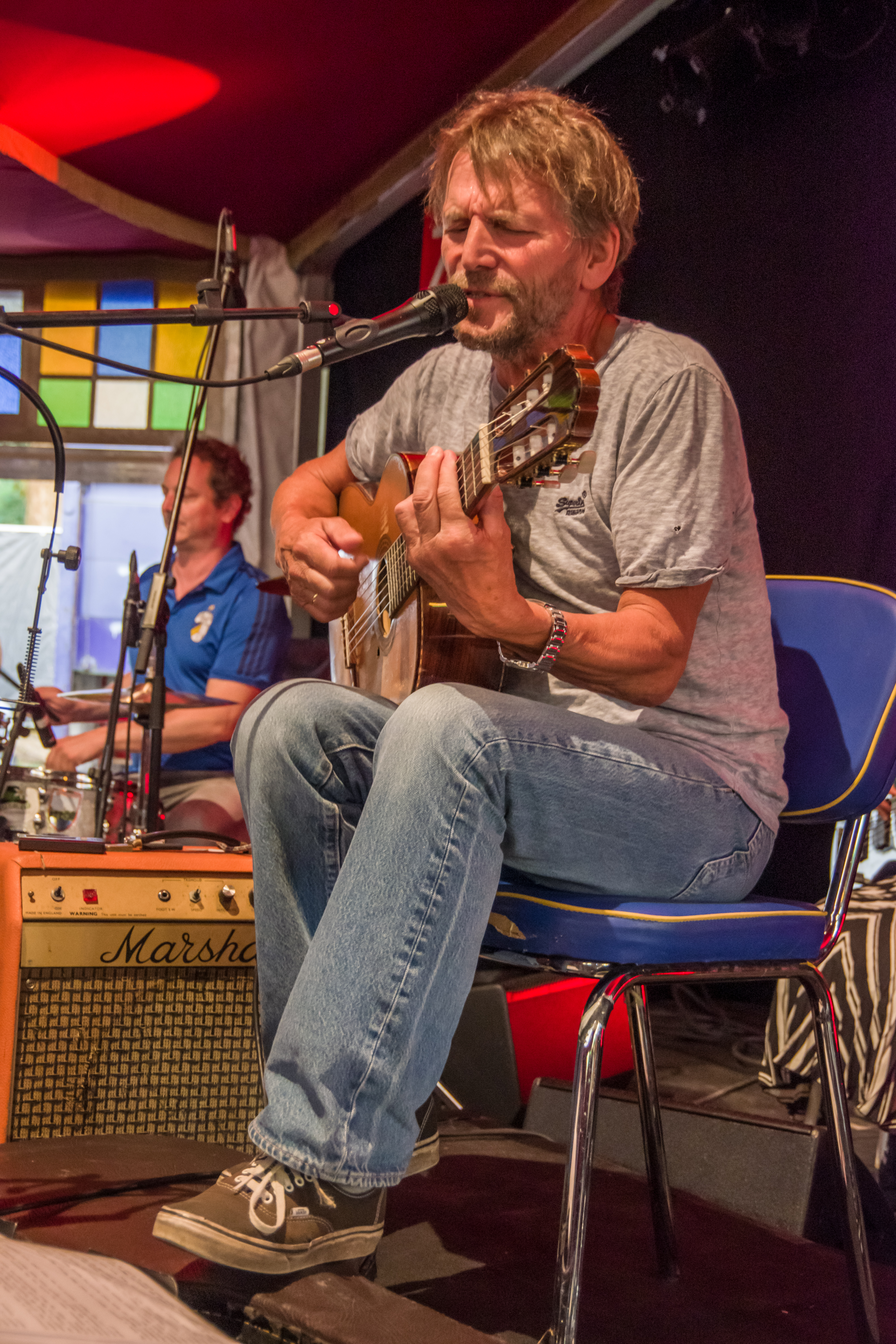 Das Zelt-Musik-Festival 2018 in Freiburg im Breisgau 23.07.2018 Hans Söllner und Bayaman'Sissdem